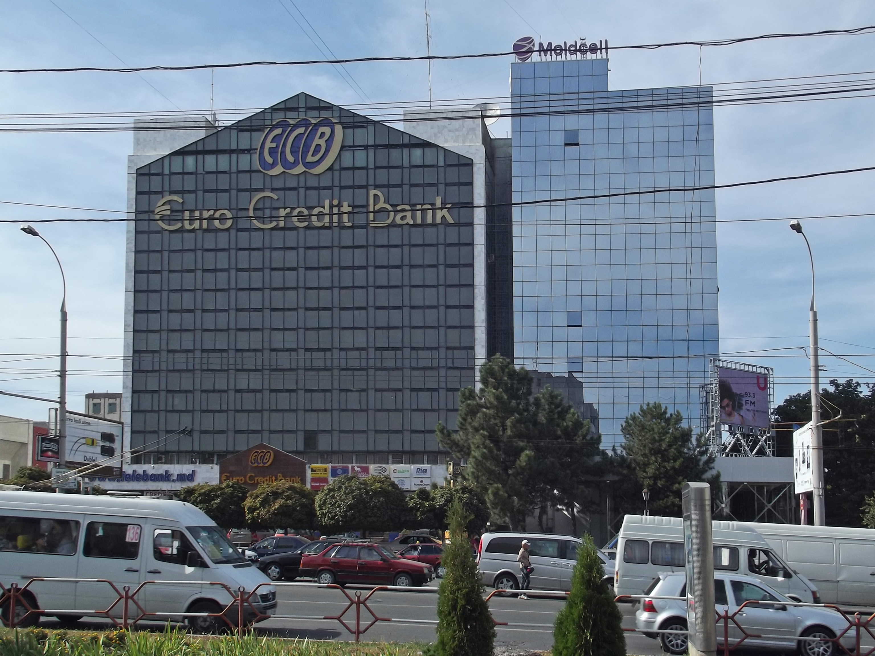 Новый банк